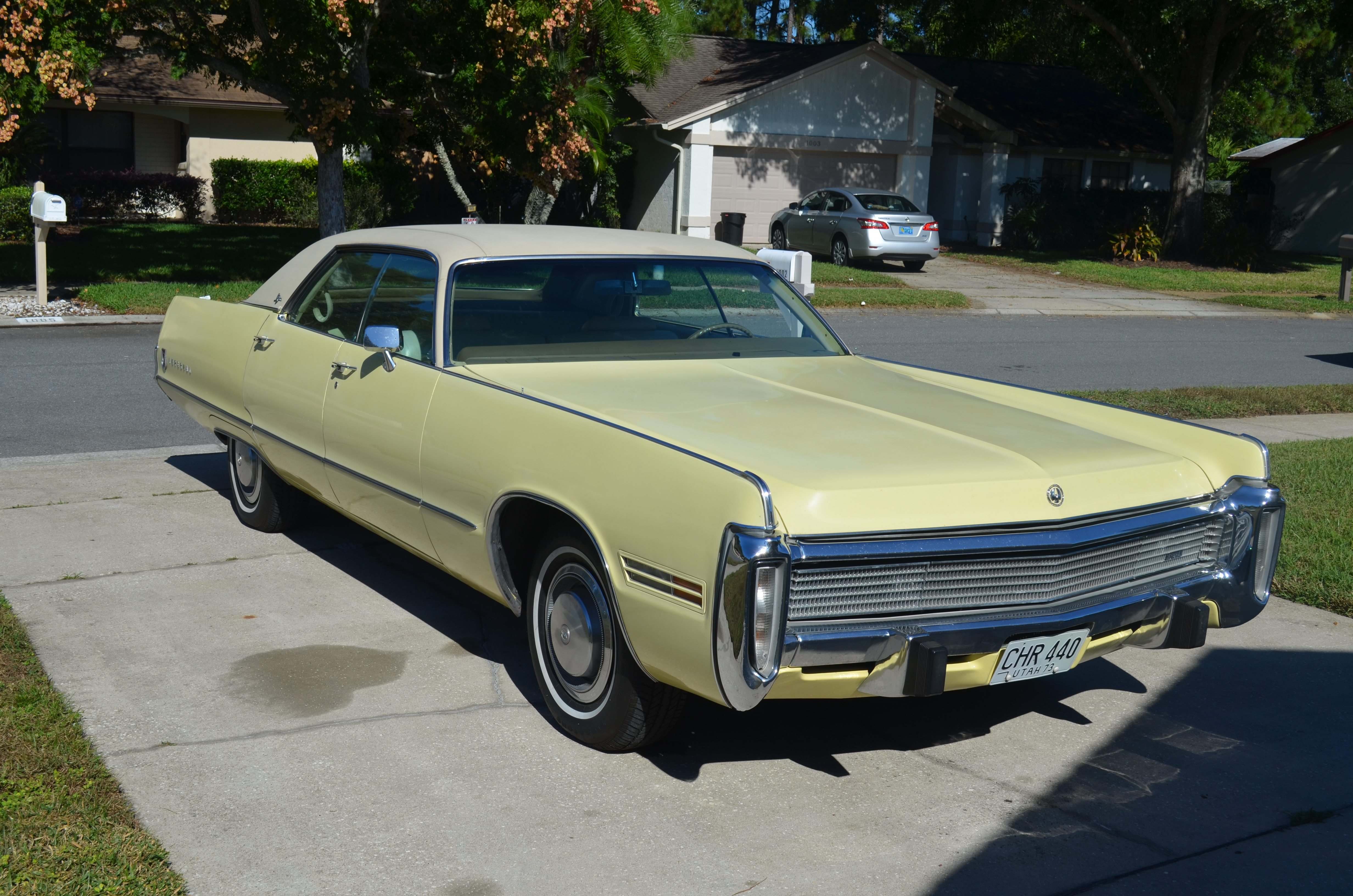 1973 Imperial Le Baron from Mauro Pietro